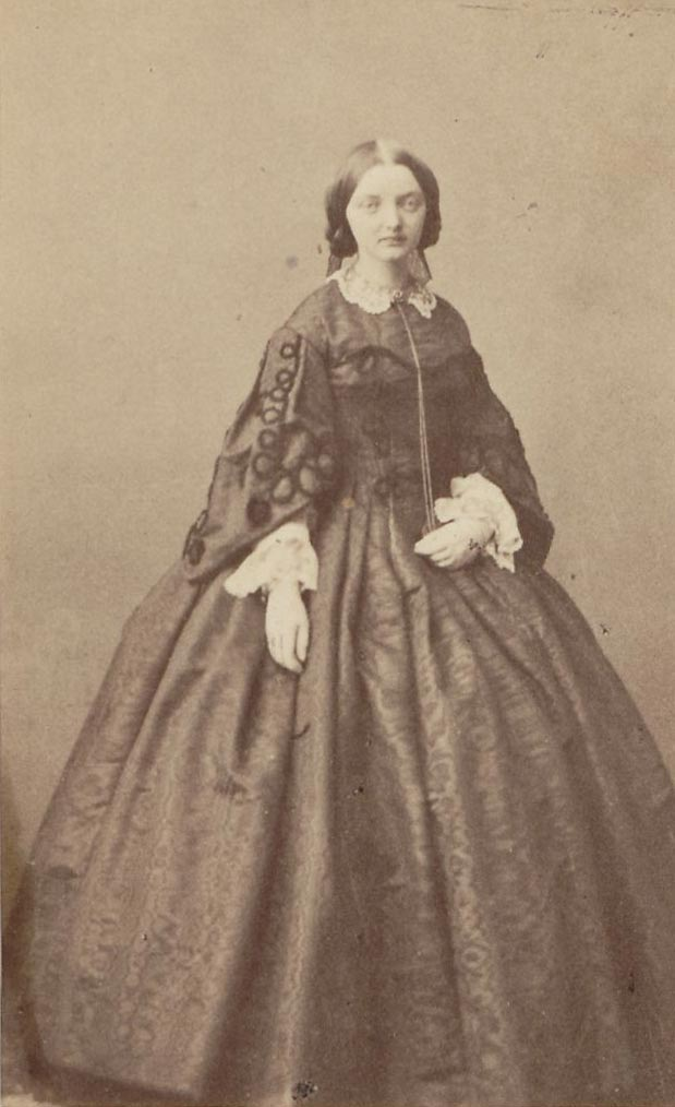 Marie von Gemmingen geb. von Grävenitz (* 23. November 1837; † 3. Oktober 1873) Bildquelle: Landesarchiv Baden-Württemberg, Generallandesarchiv Karlsruhe, Bestand: 69 Baden, Sammlung 1995: Fotosammlung I / ca. 1850 - 1923